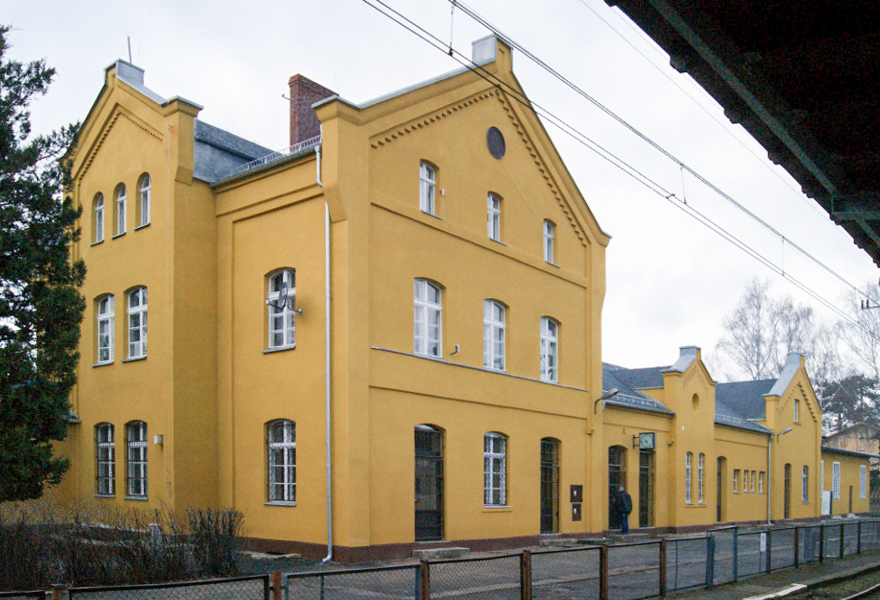 Budynek dworca na stacji Gryfów Śląski po remoncie (2015 r.)